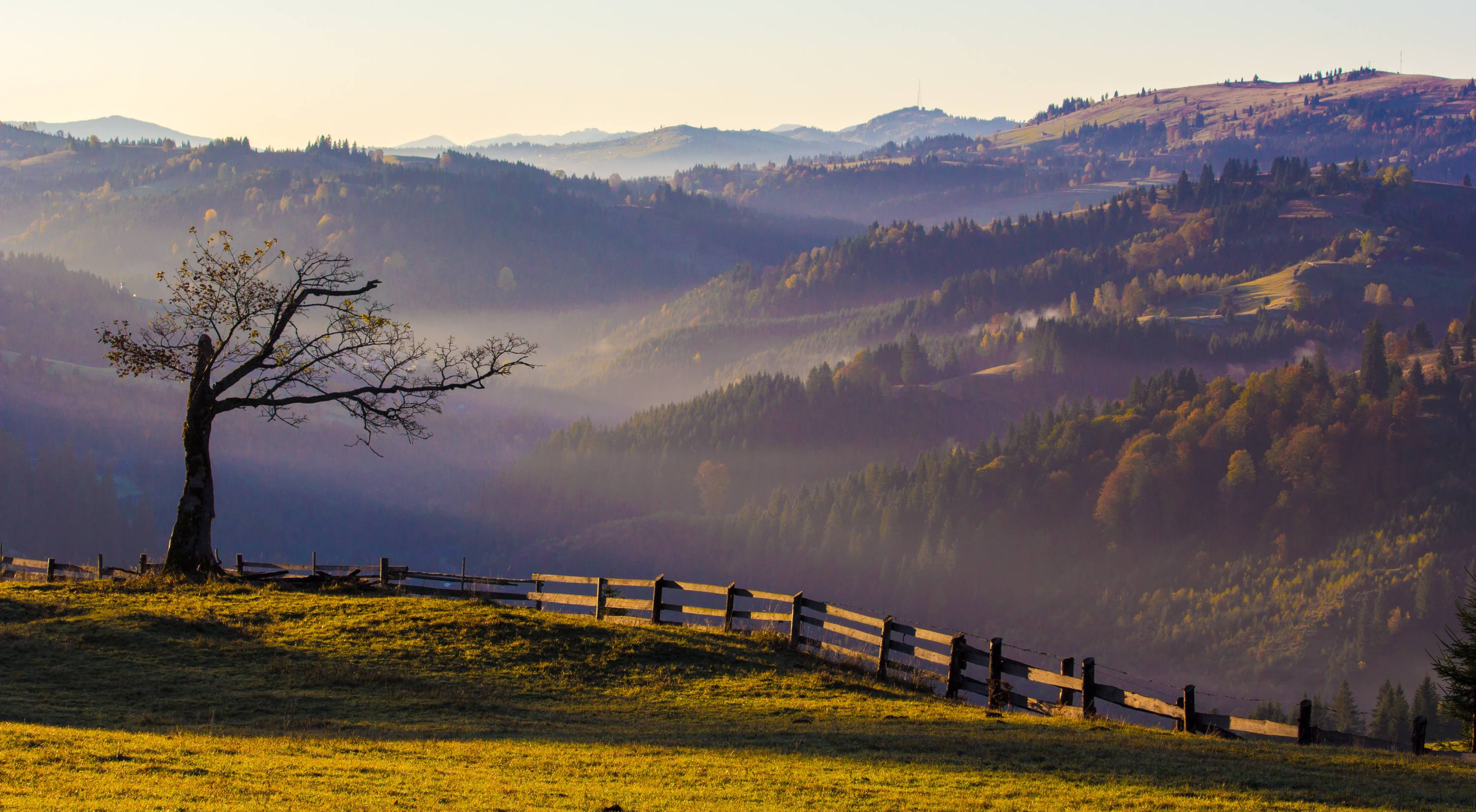 Черемоський, Путильський район